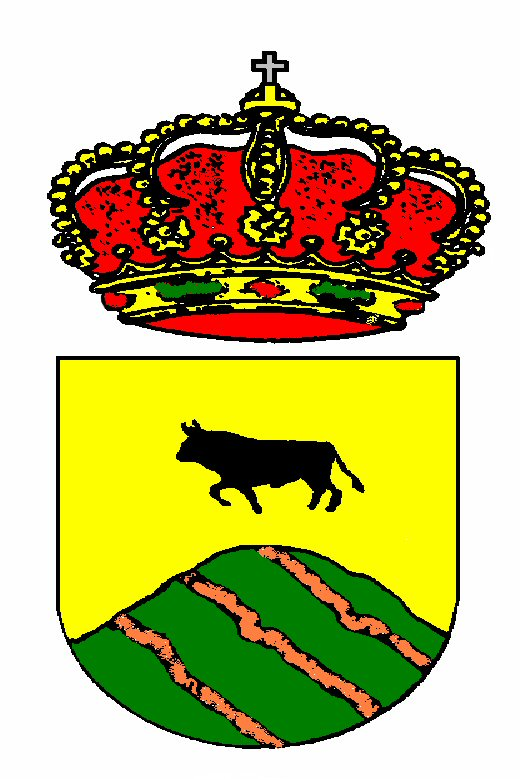 Escudo de Menasalbas (Toledo, España)